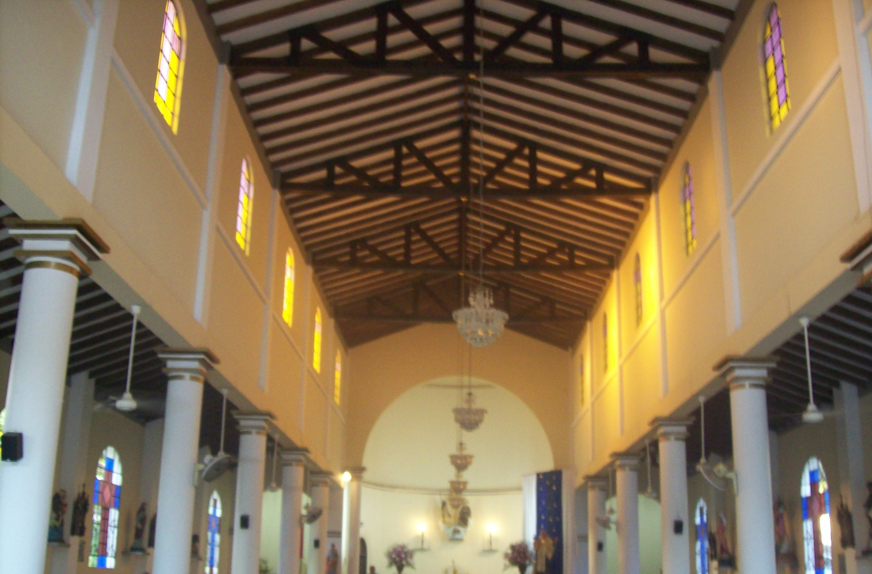 Techo de la Iglesia de la Santísima Trinidad, Puerto Salgar.